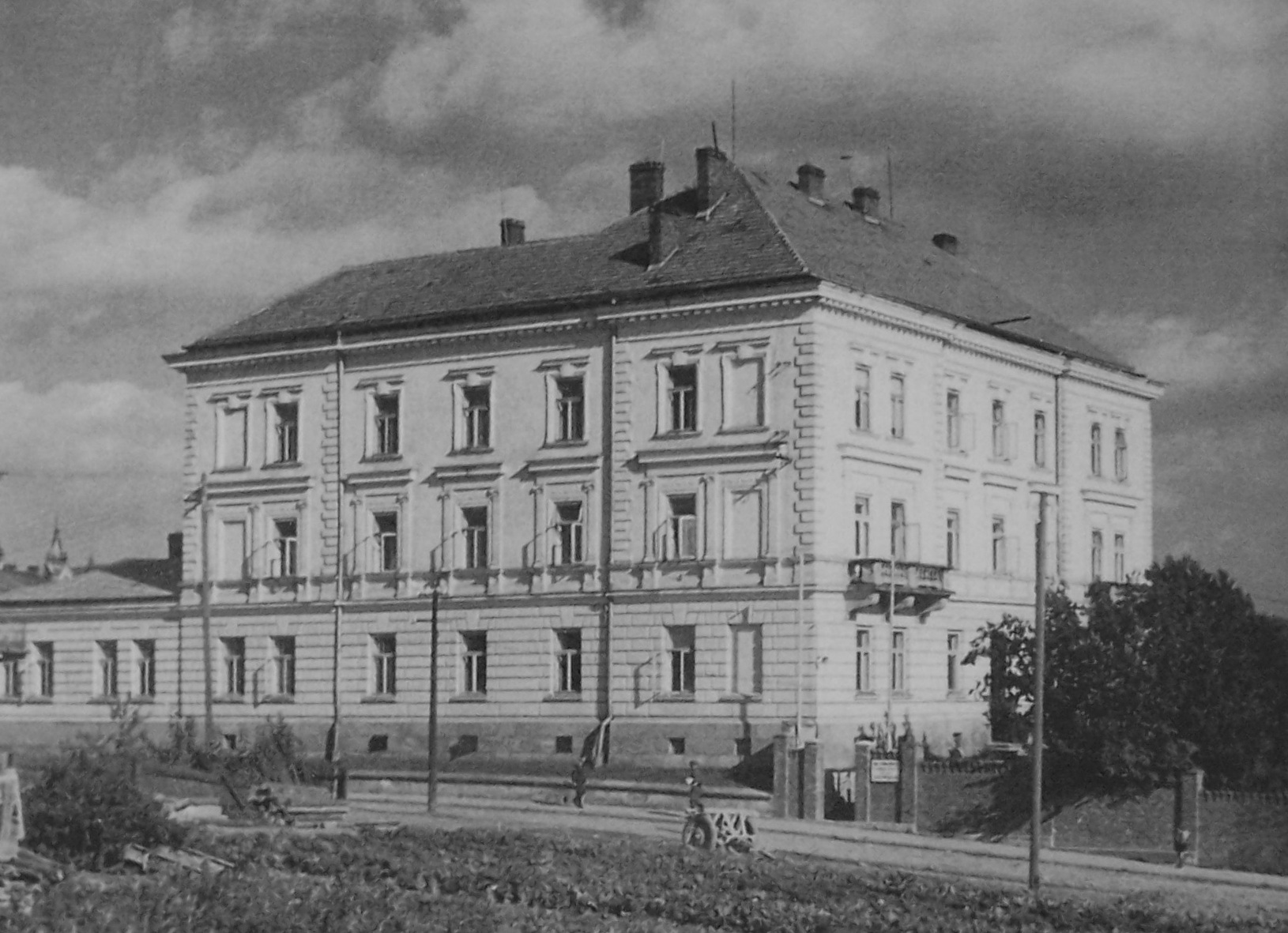 Budynek przy ul. Henryka Sienkiewicza 5 w Sanoku w latach 40. XX wieku (autor fotografii Stanisław Potocki)